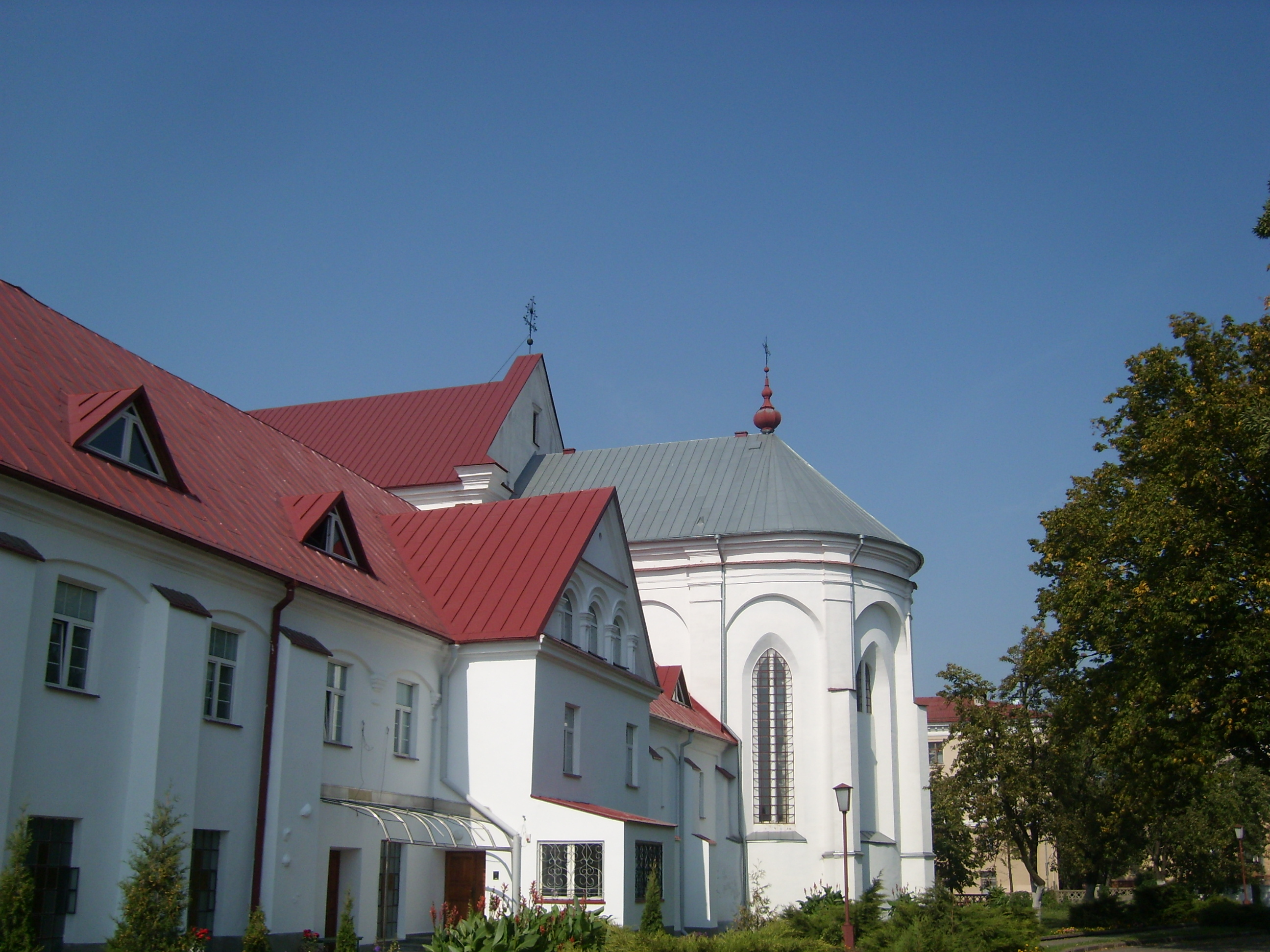 Беларуская (тарашкевіца): Ансамбль былога кляштара бернардзінцаў:касьцёл са званіцайдэкаратыўнае аздабленьне інтэр’ера касьцёла: галоўны алтар, восем алтароў, фрэскавыя кампазіцыі цэнтральнага нэфа, арнамэнтальныя росьпісы ілепка, барэльефныя кампазіцыі,хоры, рашотка і дзьверы бабінца, дэкор Ларэтанскай капэлы, расьпісныя дзьверы ў паўночным нэфежылы корпусагароджа. г. Горадня This is a photo of Belarusian heritage monument. Reference number: 412Г000018 ( WLM)